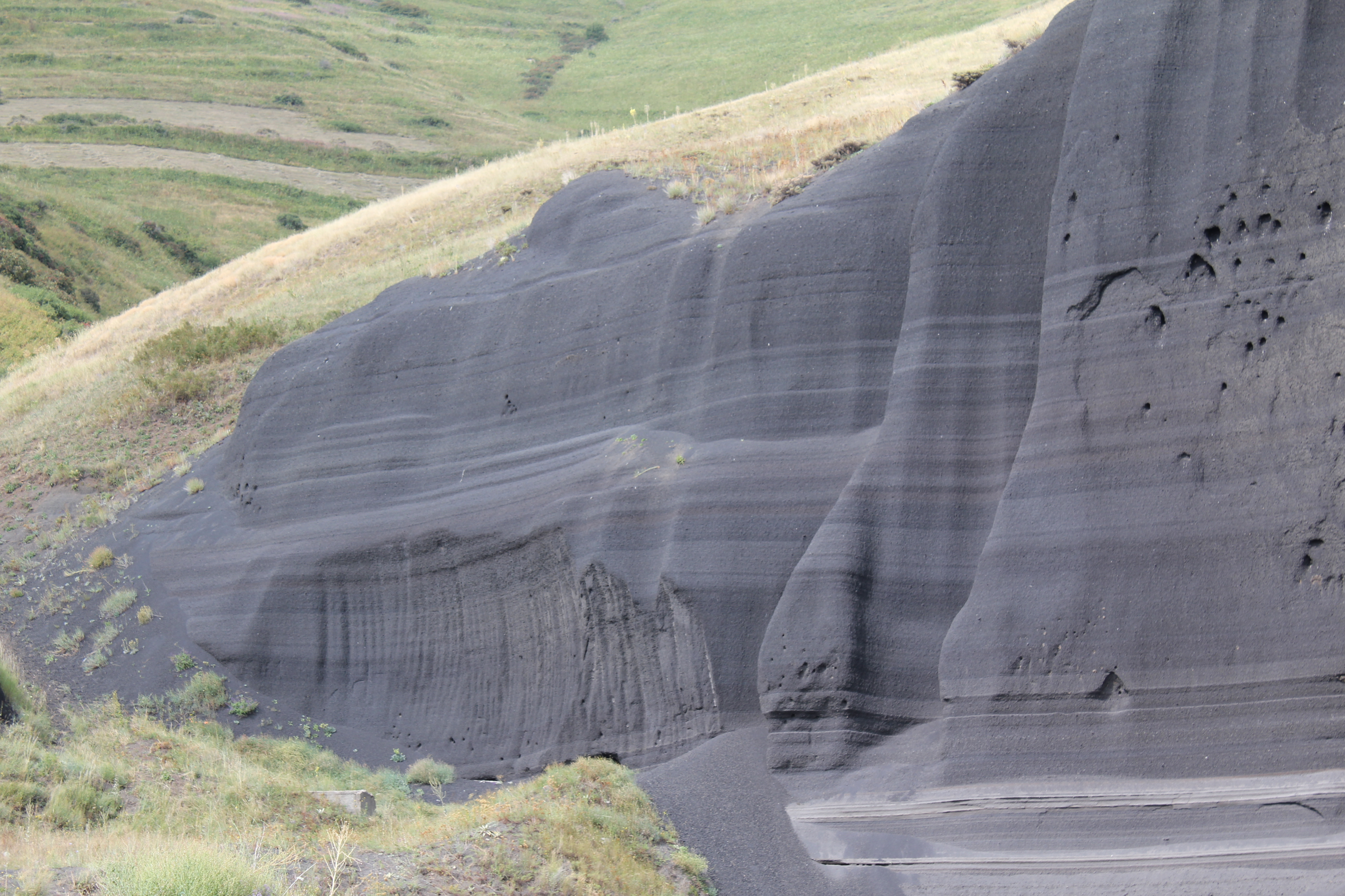 Лава вулкана Гутанасар близ села Фантан. Котайкский марз Армении